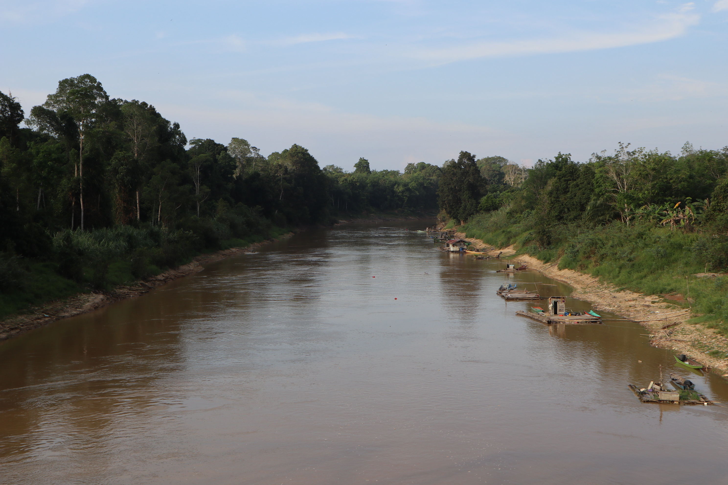 Sungai Kedang Pahu, anak sungai Mahakam yang mengaliri wilayah kecamatan Muara Pahu, Muara Lawa, dan Damai (Kabupaten Kutai Barat, Kalimantan Timur).